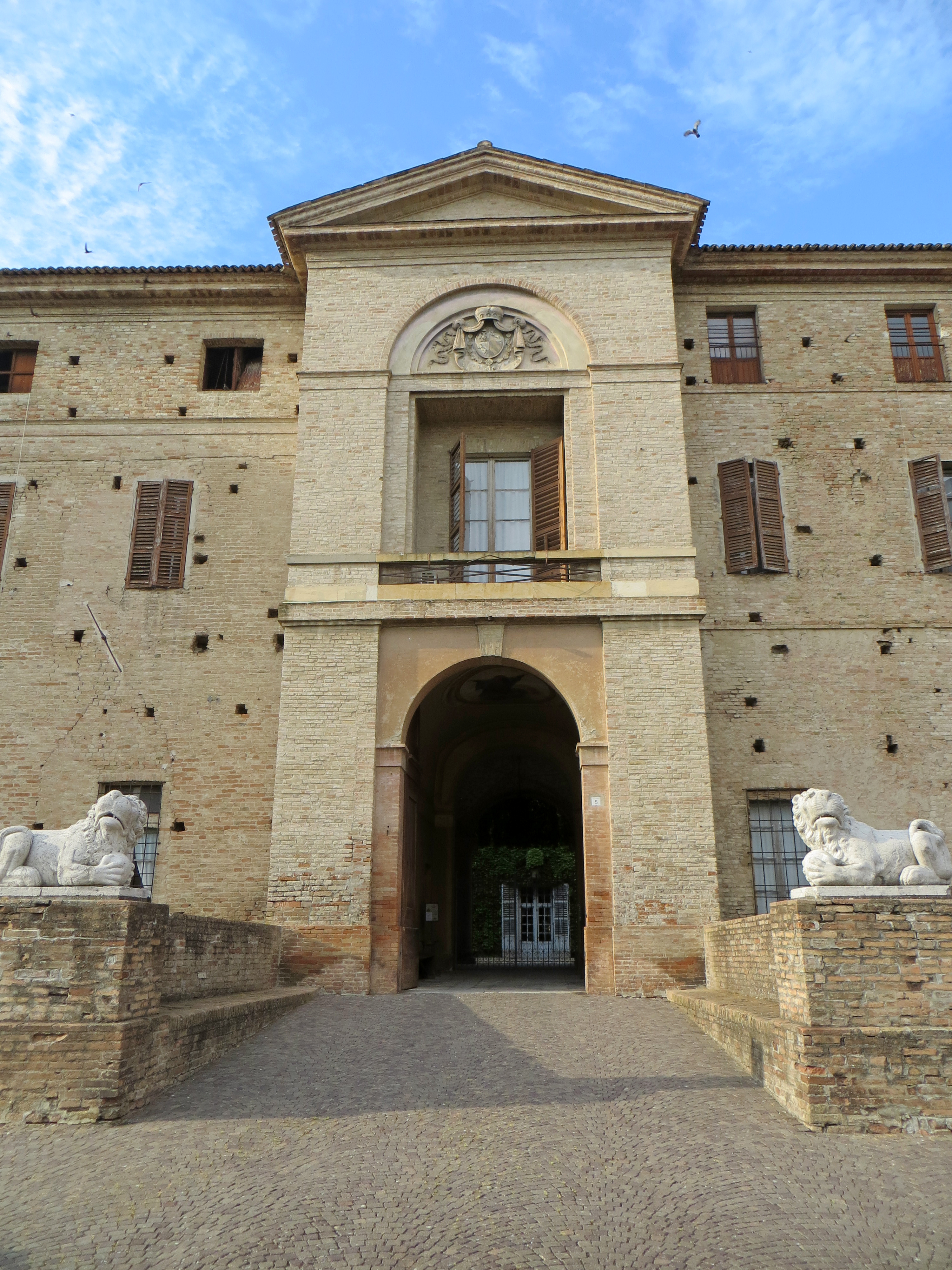 Rocca Meli Lupi (Soragna) - corpo centrale della facciata